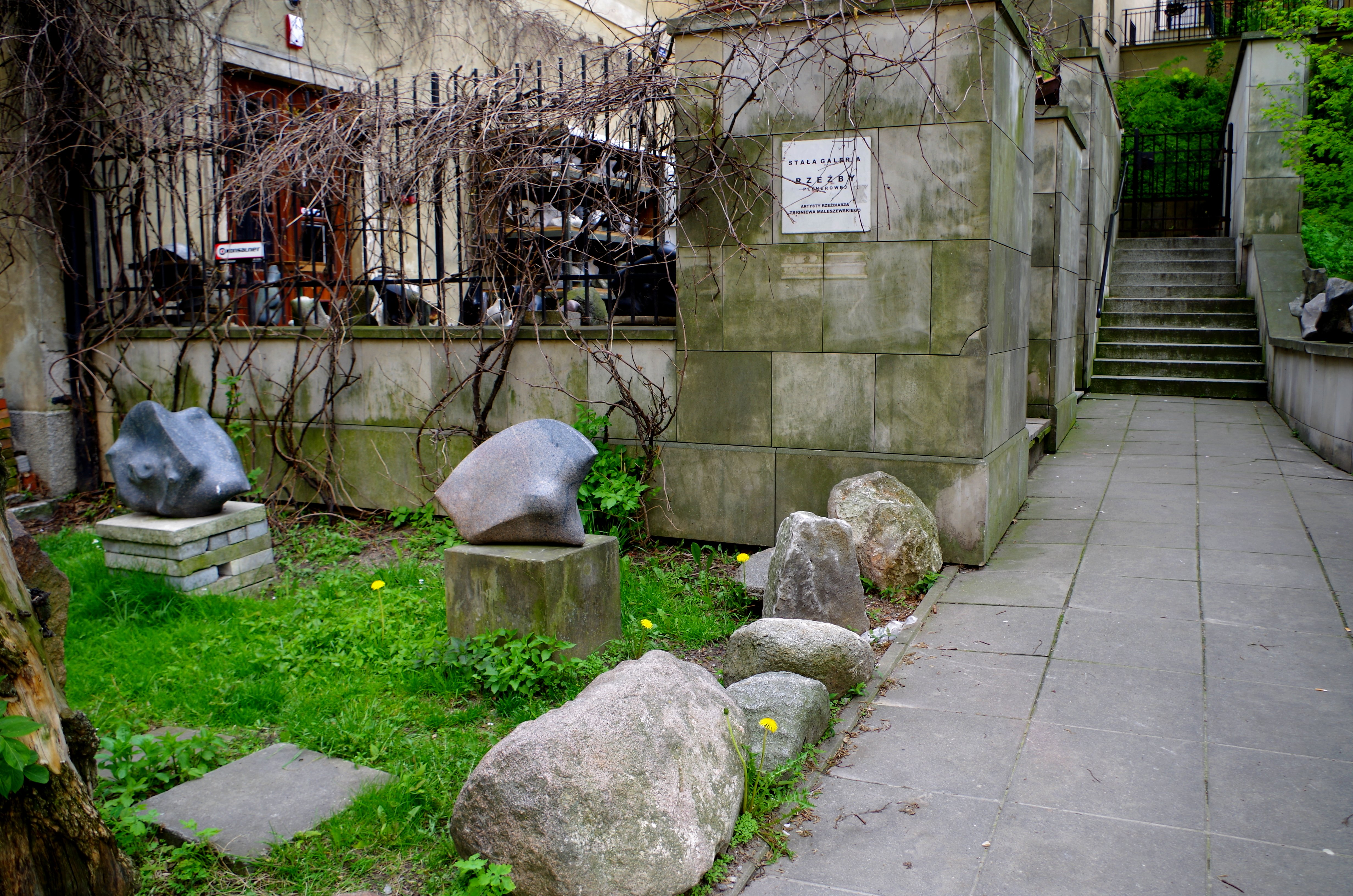 Stała Galeria Rzeźby Plenerowej Zbigniewa Maleszewskiego na Starym Mieście w Warszawie